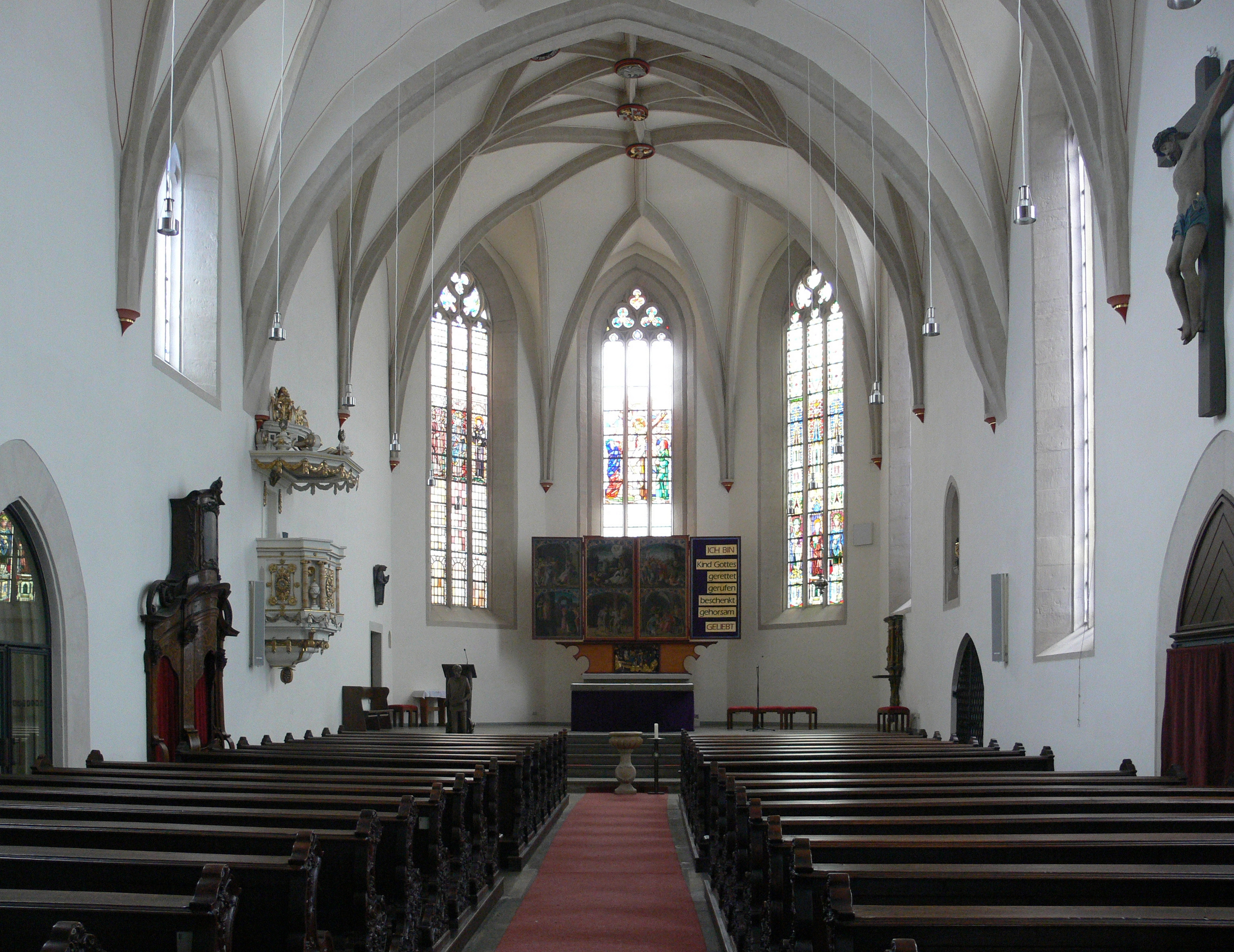 Wigbertikirche Erfurt Innenansicht